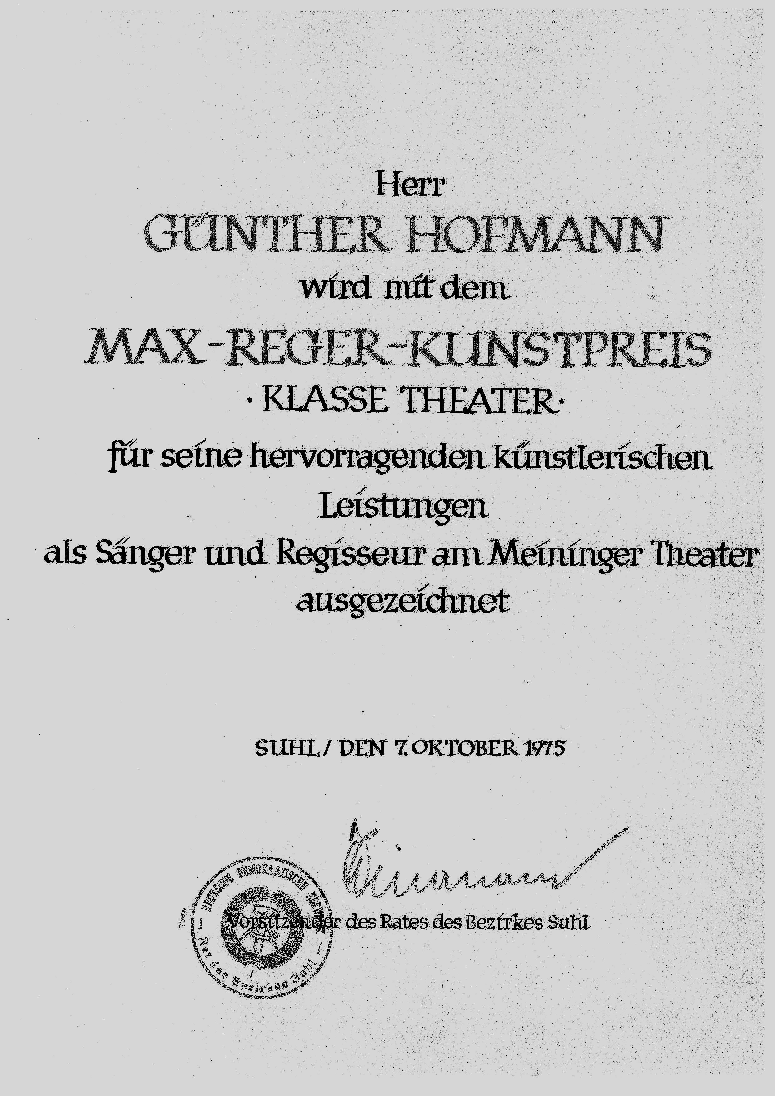 Urkunde zum Max-Reger-Preis - Kopie der Originalurkunde aus dem Nachlass von Günther Hofmann im Archivportal Thüringen. Abgerufen am 31. Juli 2014.